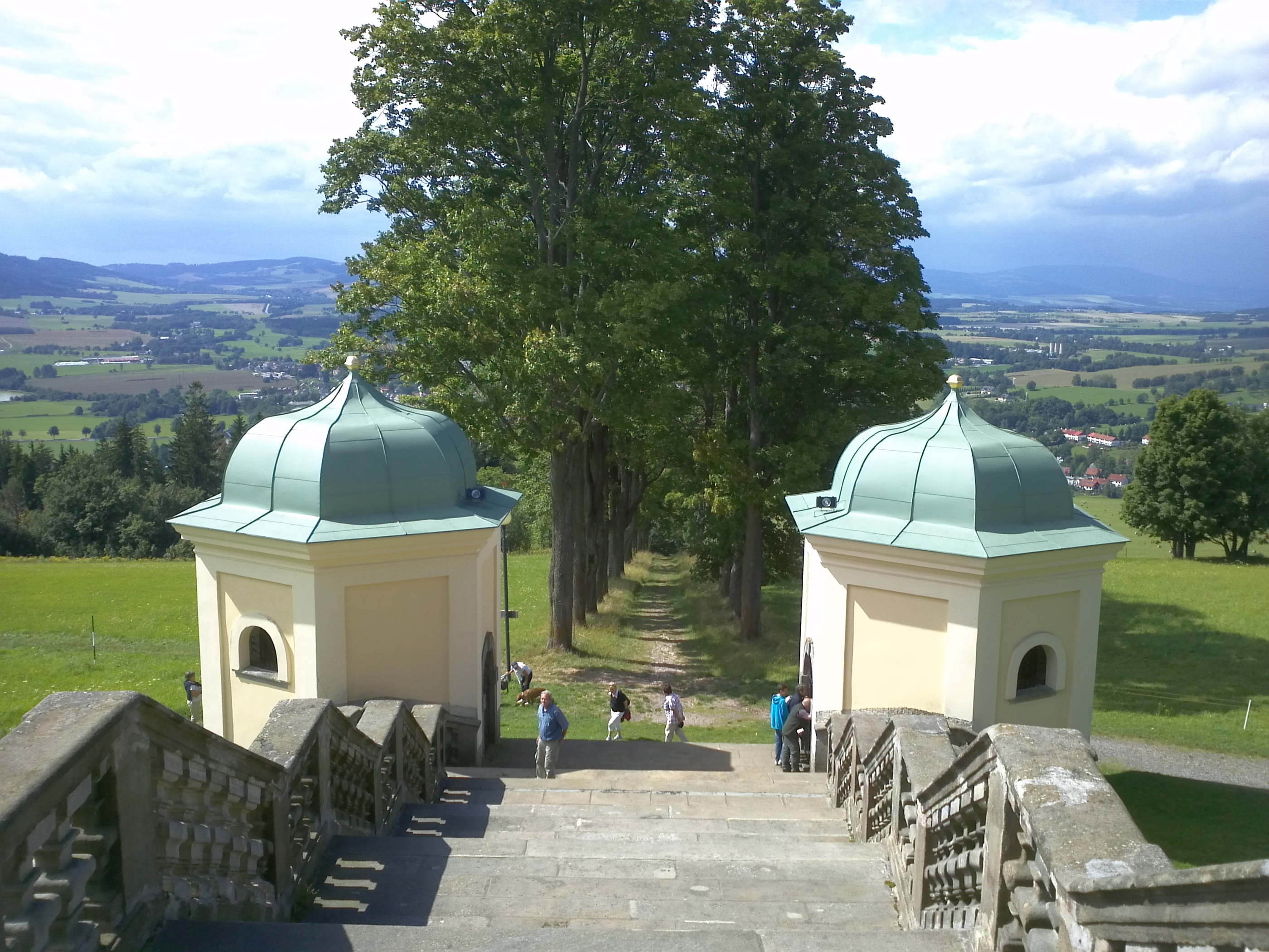 Hora Matky Boží - klášterní schodiště a křížová cesta do Králík.